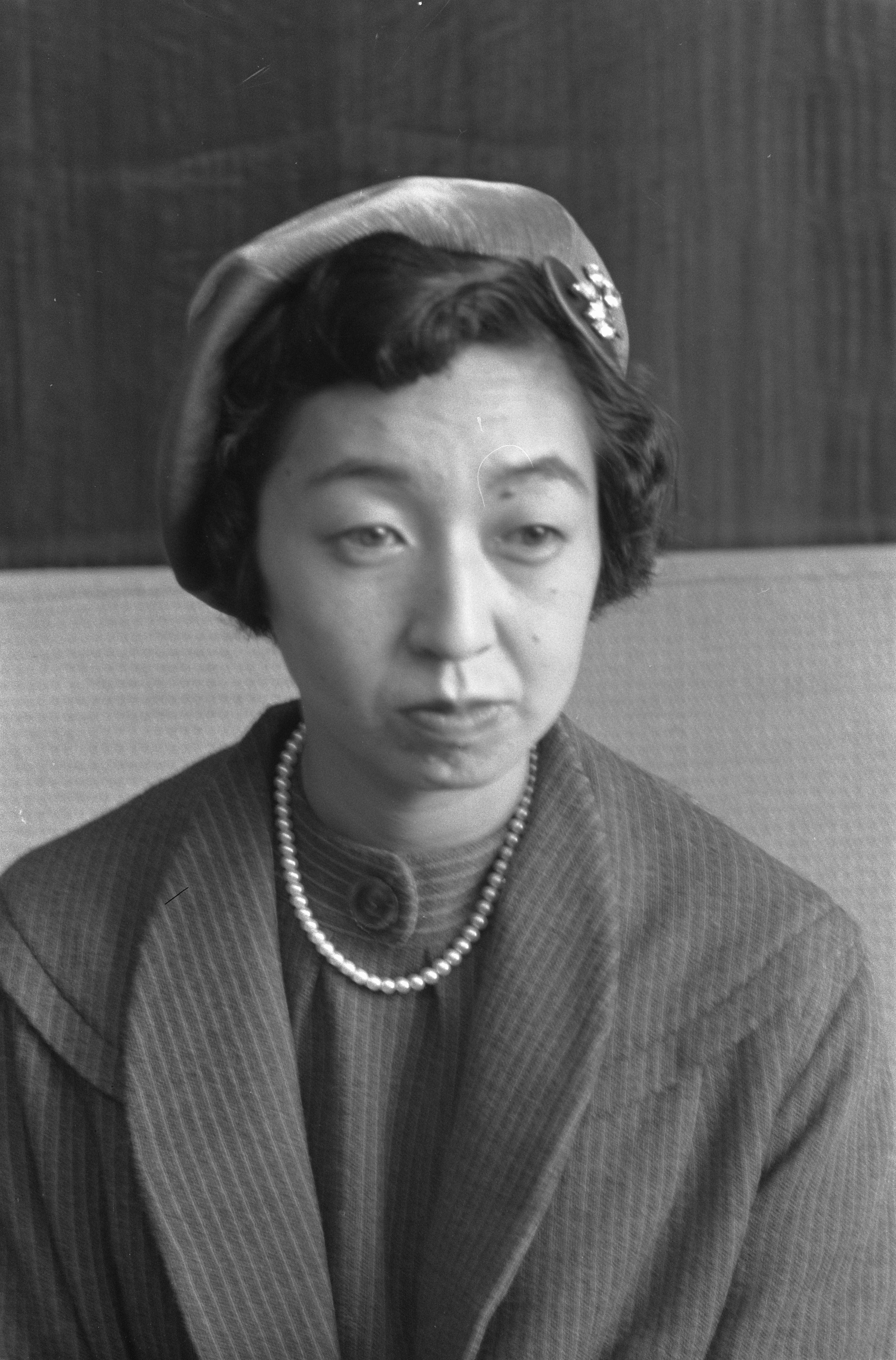 Collectie / Archief : Fotocollectie Anefo Reportage / Serie : [ onbekend ] Beschrijving : Dochter van de Keizer van Japan , Shigeko Higashikuni op Schiphol Datum : 14 oktober 1959 Locatie : Noord-Holland, Schiphol Trefwoorden : aankomst en vertrek, portretten, prinsessen Persoonsnaam : Higashikuni Shigeko Fotograaf : Pot, Harry / Anefo Auteursrechthebbende : Nationaal Archief Materiaalsoort : Negatief (zwart/wit) Nummer archiefinventaris : bekijk toegang 2.24.01.05 Bestanddeelnummer : 910-7440